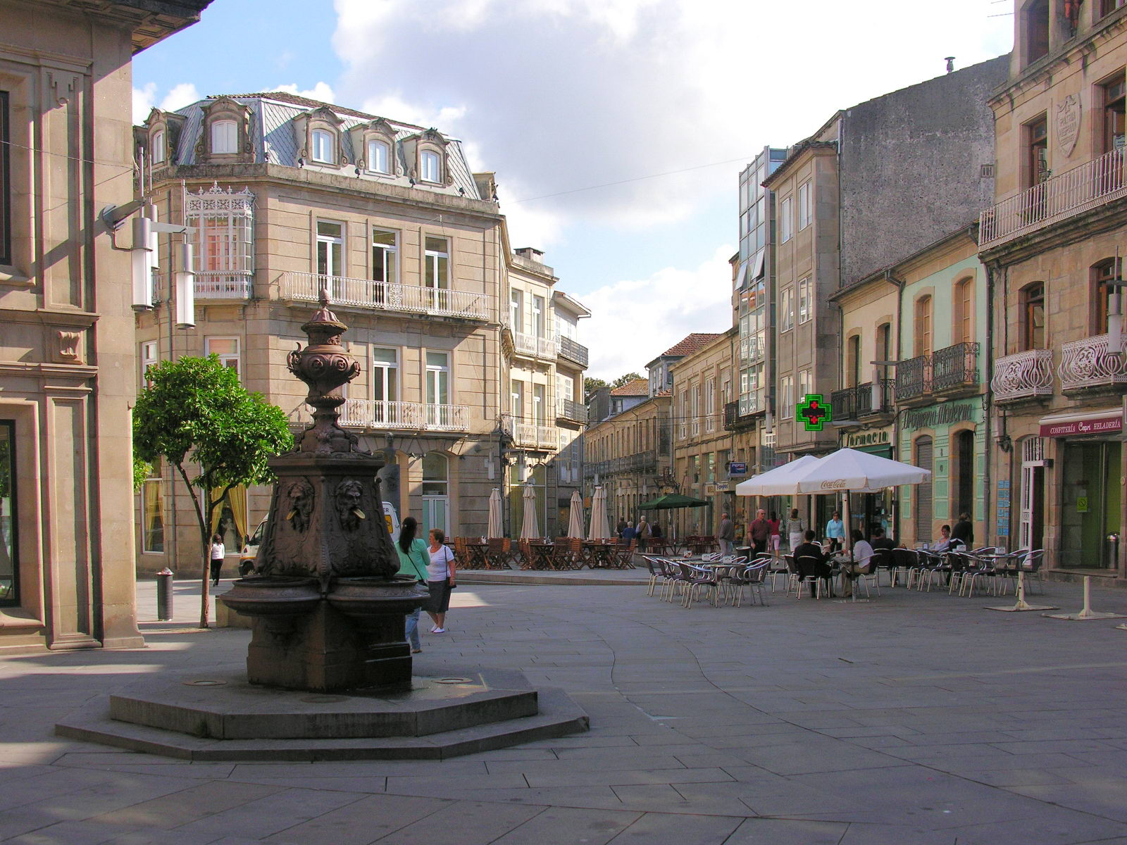 Praza de Curros Enríquez. Pontevedra, Galicia Publish by= Luis Miguel Bugallo Sánchez.